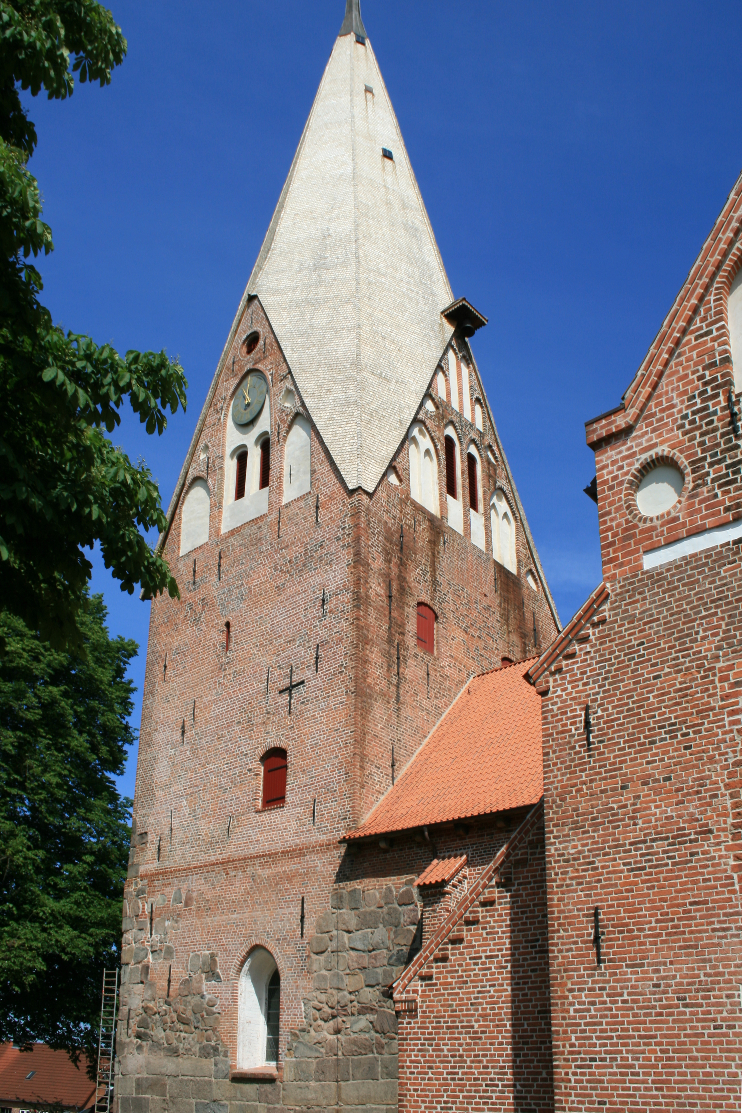 Kirchturm der St.-Jürgen-Kirche in Gettorf (Schleswig-Holstein), erbaut 1491-94